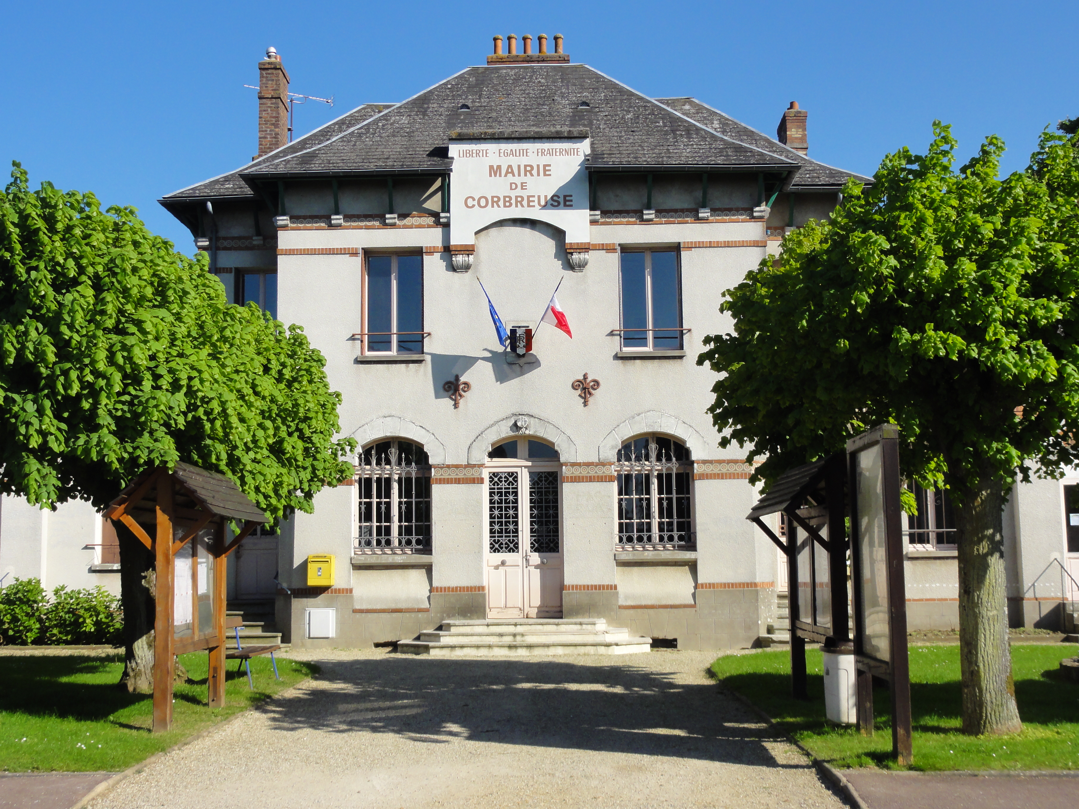 Mairie vue de face, drapeaux français et européen, ni voitures ni personnages. Ciel bleu de printemps.